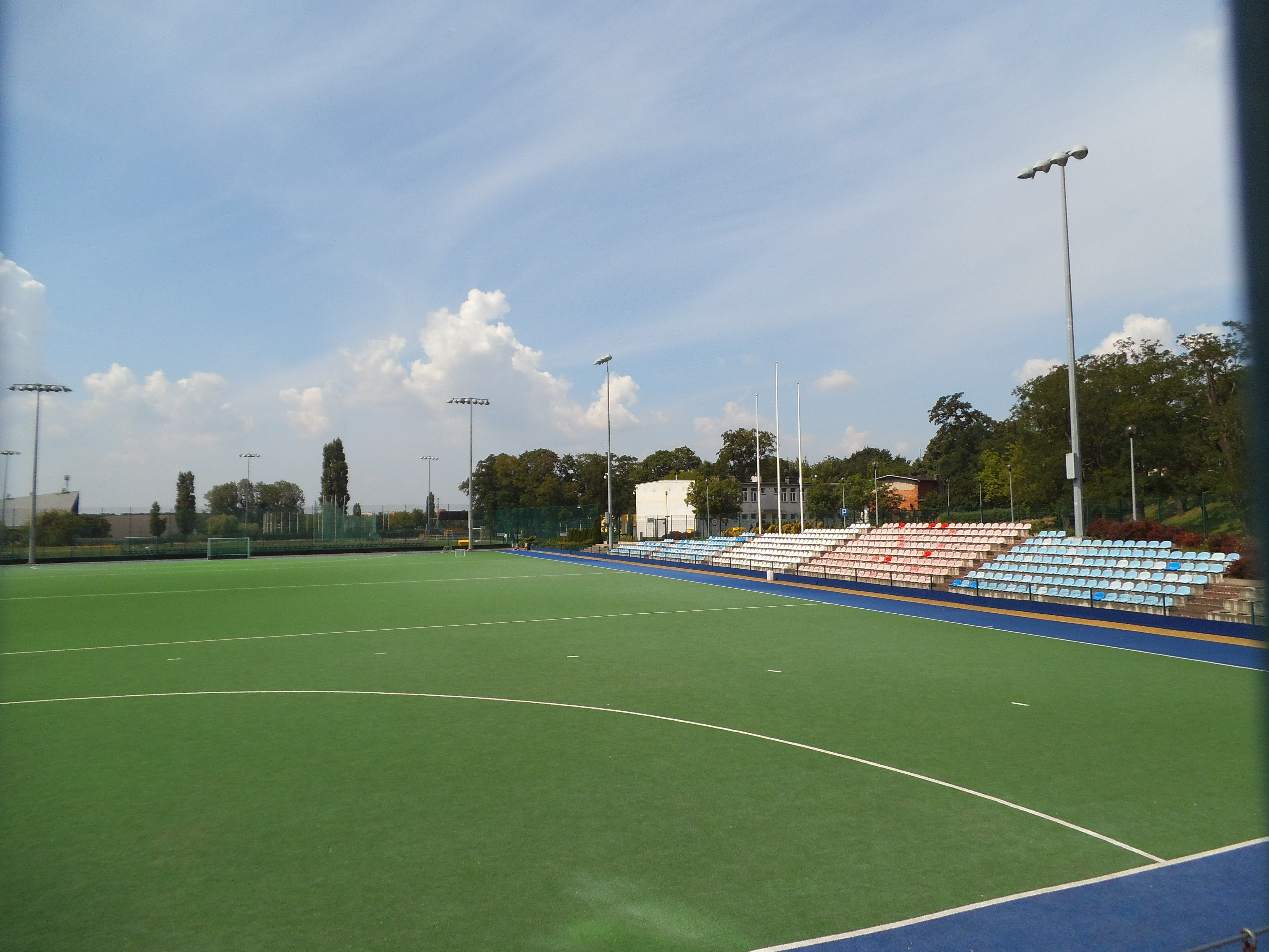 Boisko ze sztuczną nawierzchnią do hokeja na trawie w Toruniu